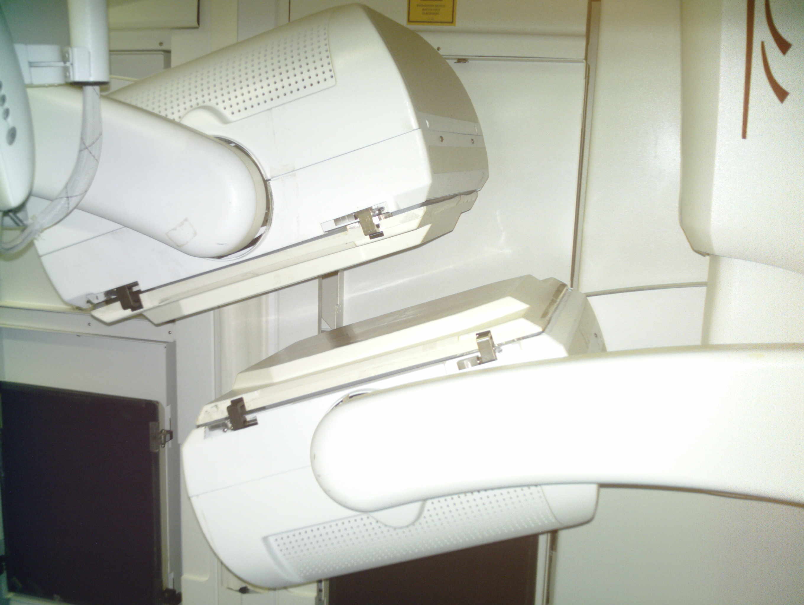 Tête de gamma-camera d'un appareil dans un service de médecine nucléaire. Celle-ci sont fixées sur un système de rail permettant de créer des incidences différentes d'un tomographe classique avec les têtes fixées à un anneau.